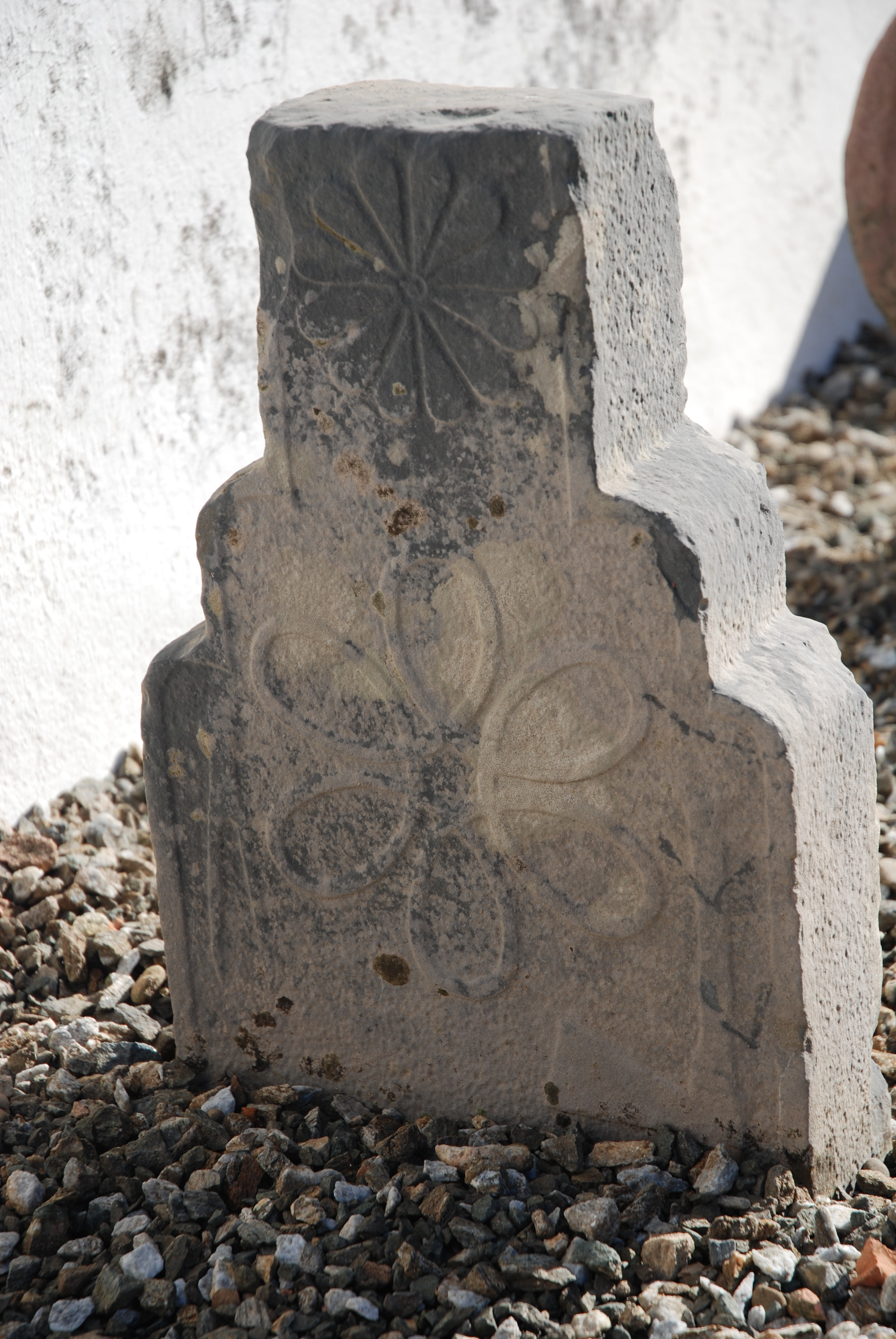 Itxassou, stèle basque